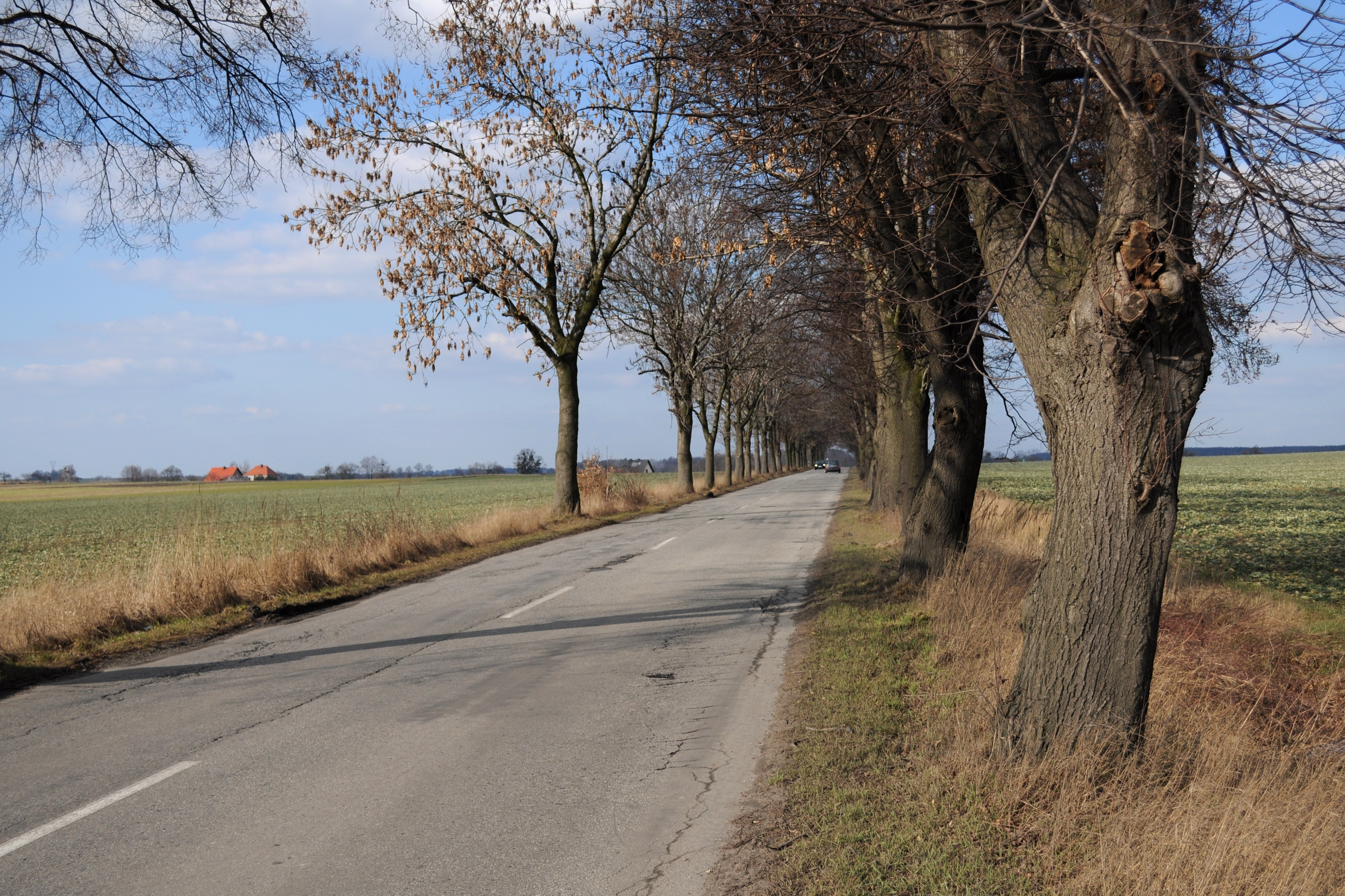 Droga pomiedzy Ziemięcicami i Boniowicami.